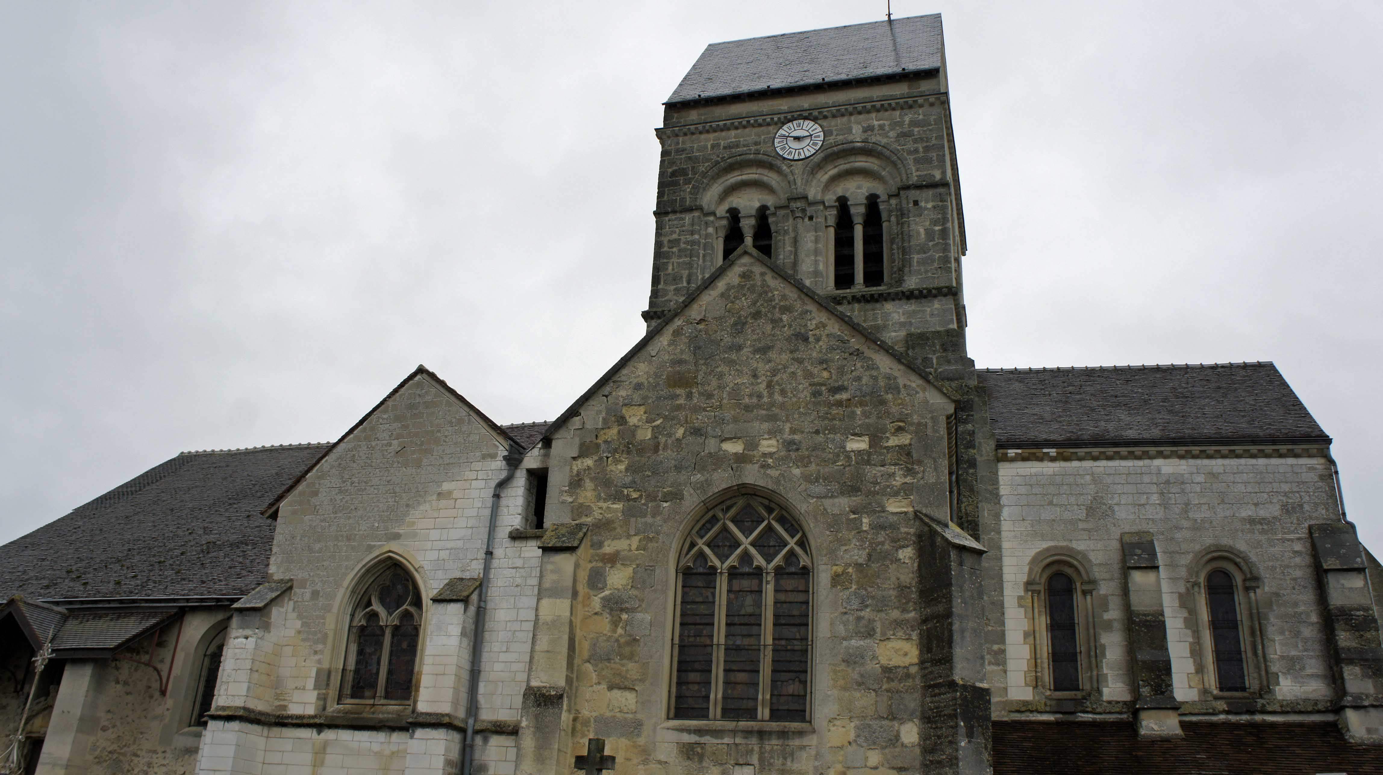 Église de la ville de Jâlons.